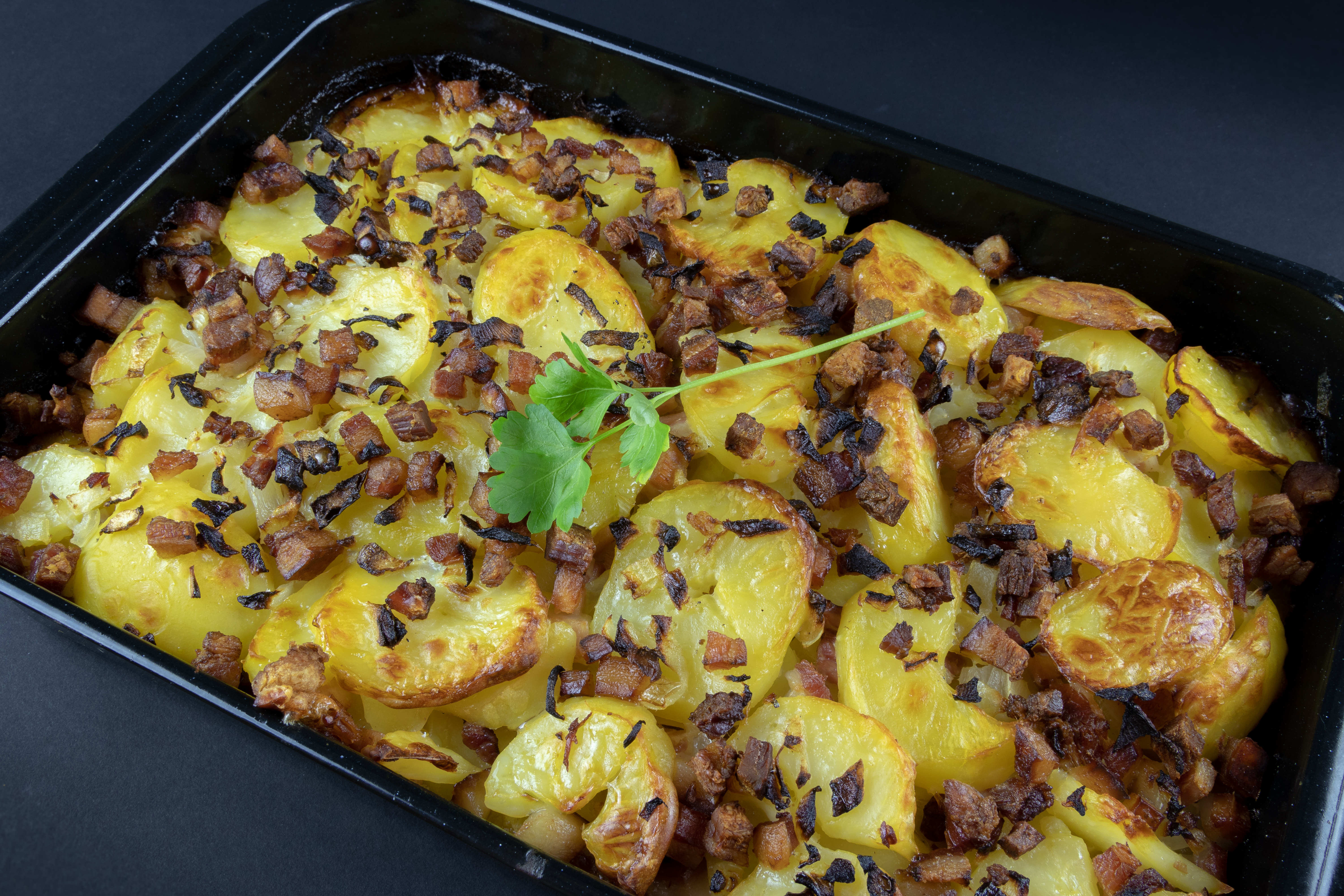 Schinkenbegräbnis - Kartoffelauflauf in der Auflaufform, fertig gebacken